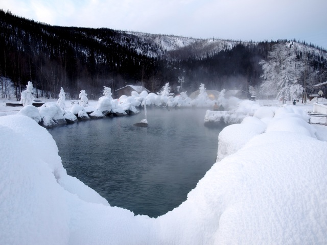 Outdoor pool at Chena Hot Springs